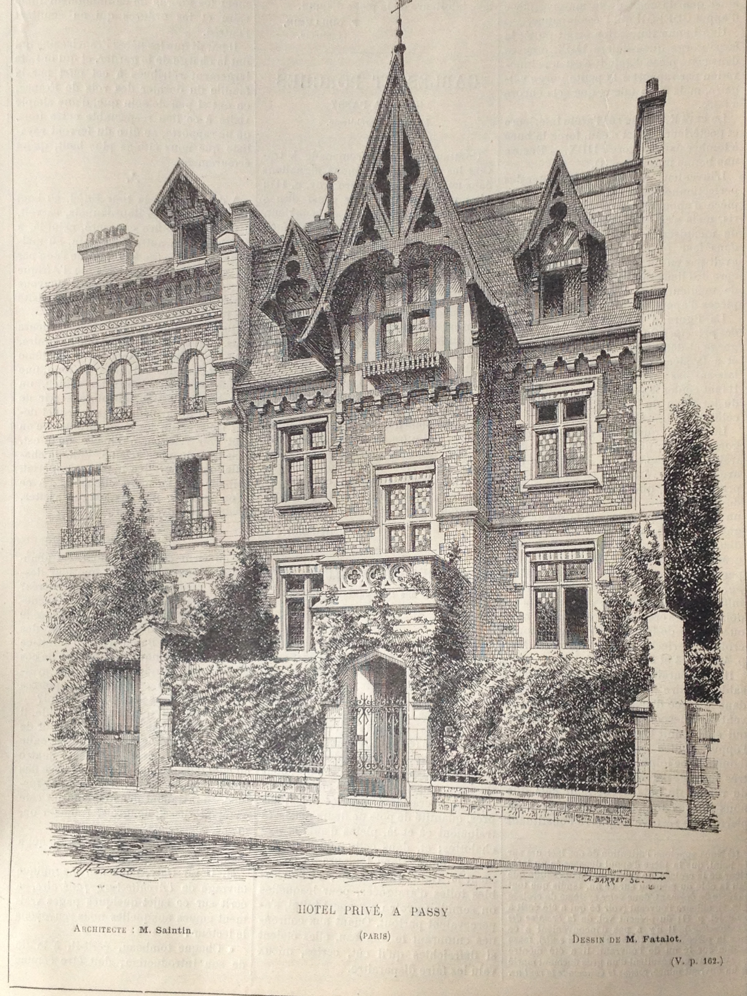 Ernest Saintin (Français, 1848-1892): Hotel particulier, 1880, à Passy, rue Théry, aujourdh'hui rue de Montevideo, XVIe arrondissement, Paris, France.